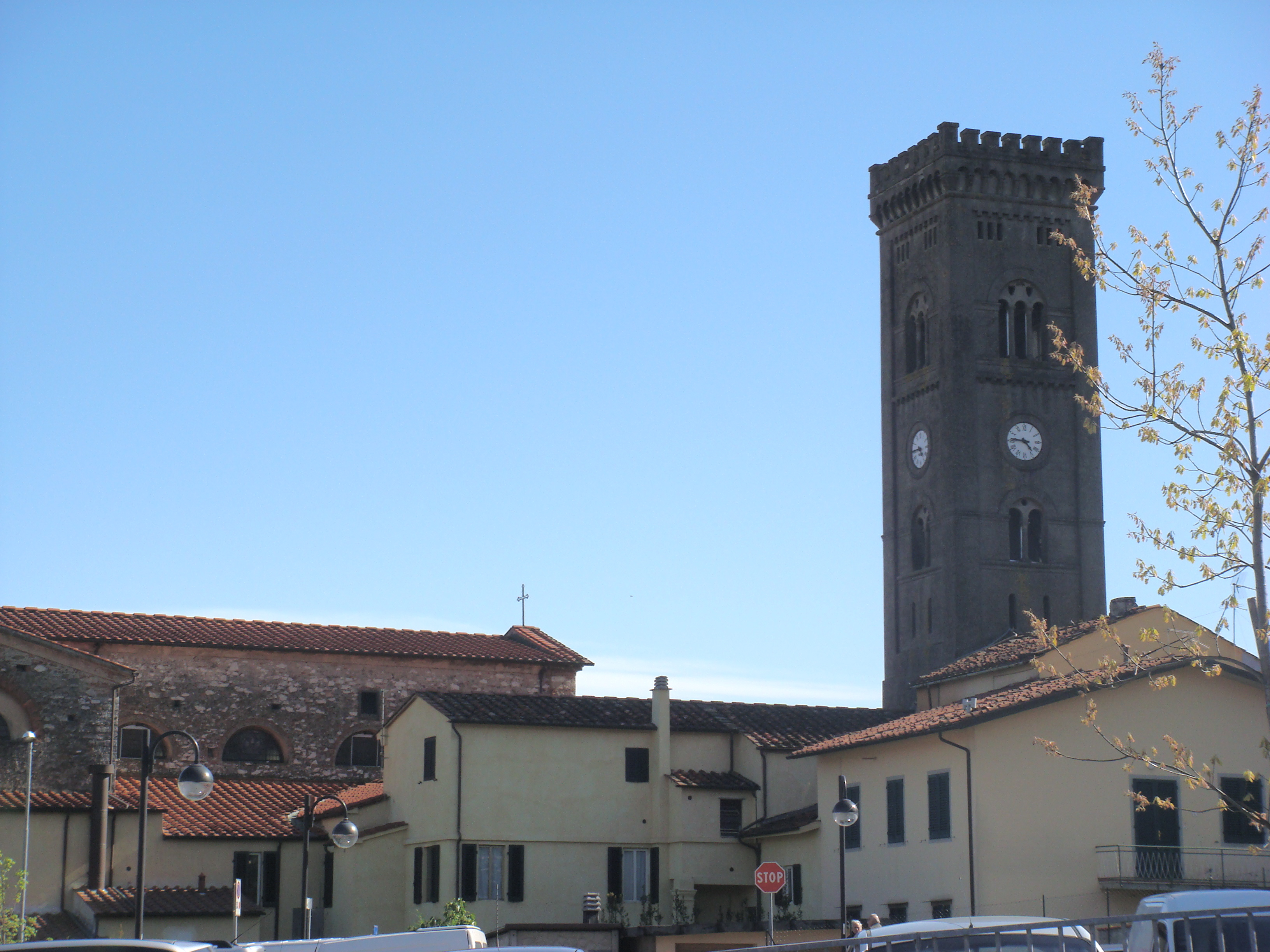 Veduta del centro di Pieva a Nievole (Provincia di Pistoia, Italia)